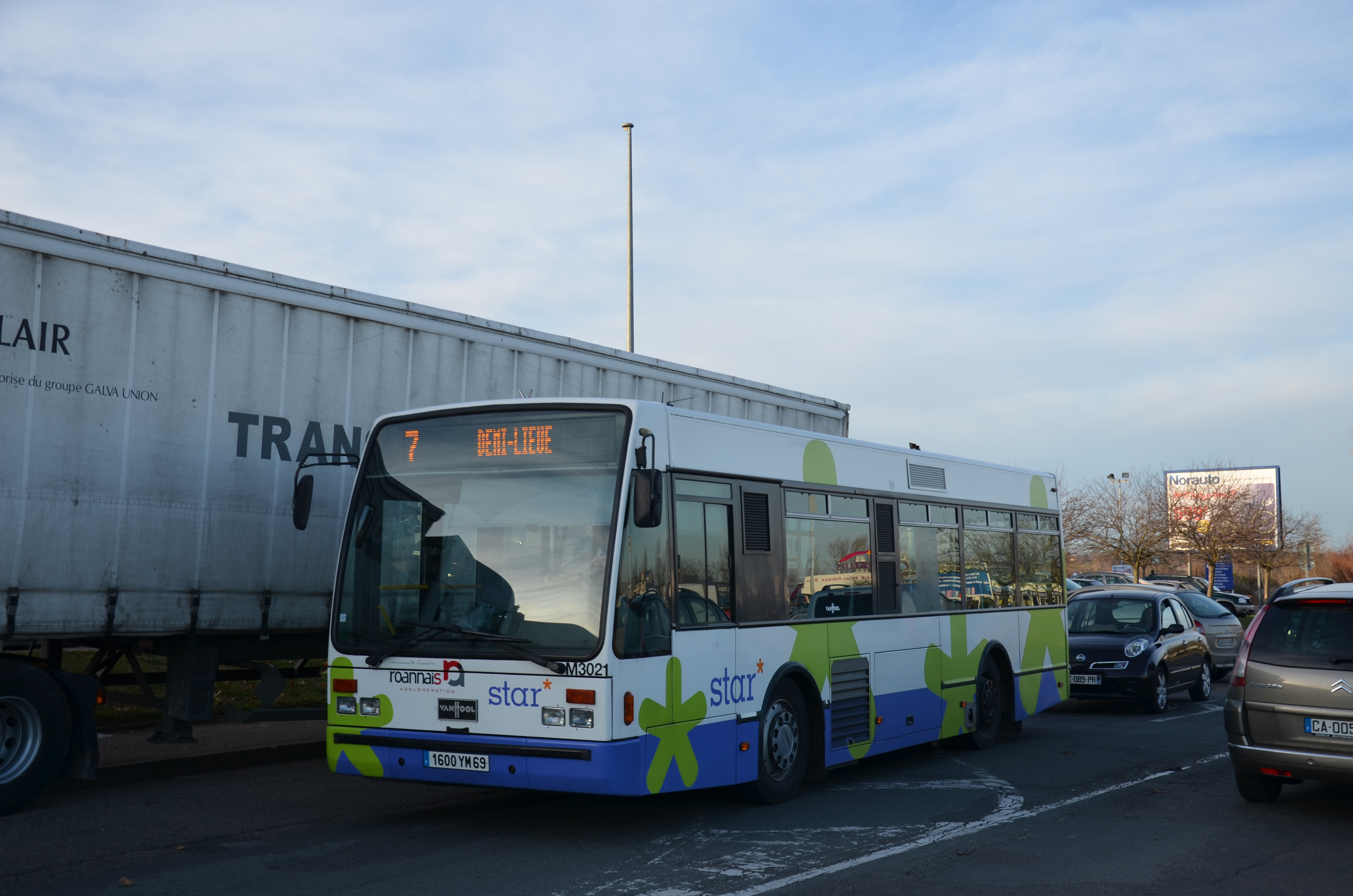 Van Hool A308 M3021 sur la ligne 7 du réseau STAR de Roanne, près de l'arrêt Demi-Lieue.